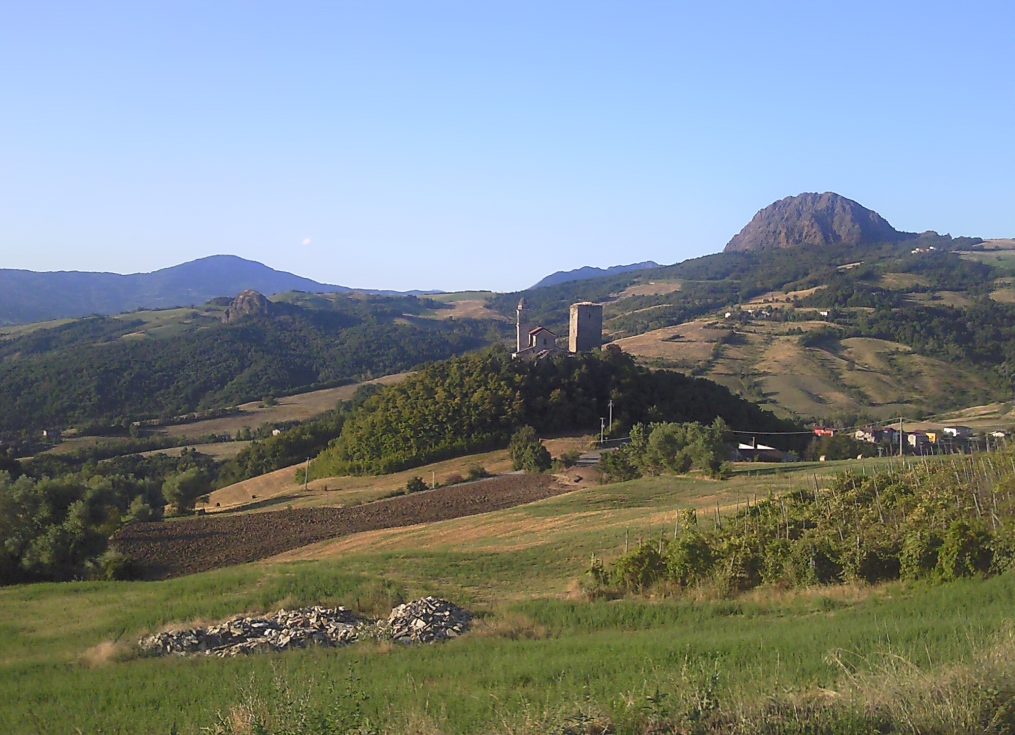 Torrione e chiesa di Bobbiano dai pressi di Bergonzi